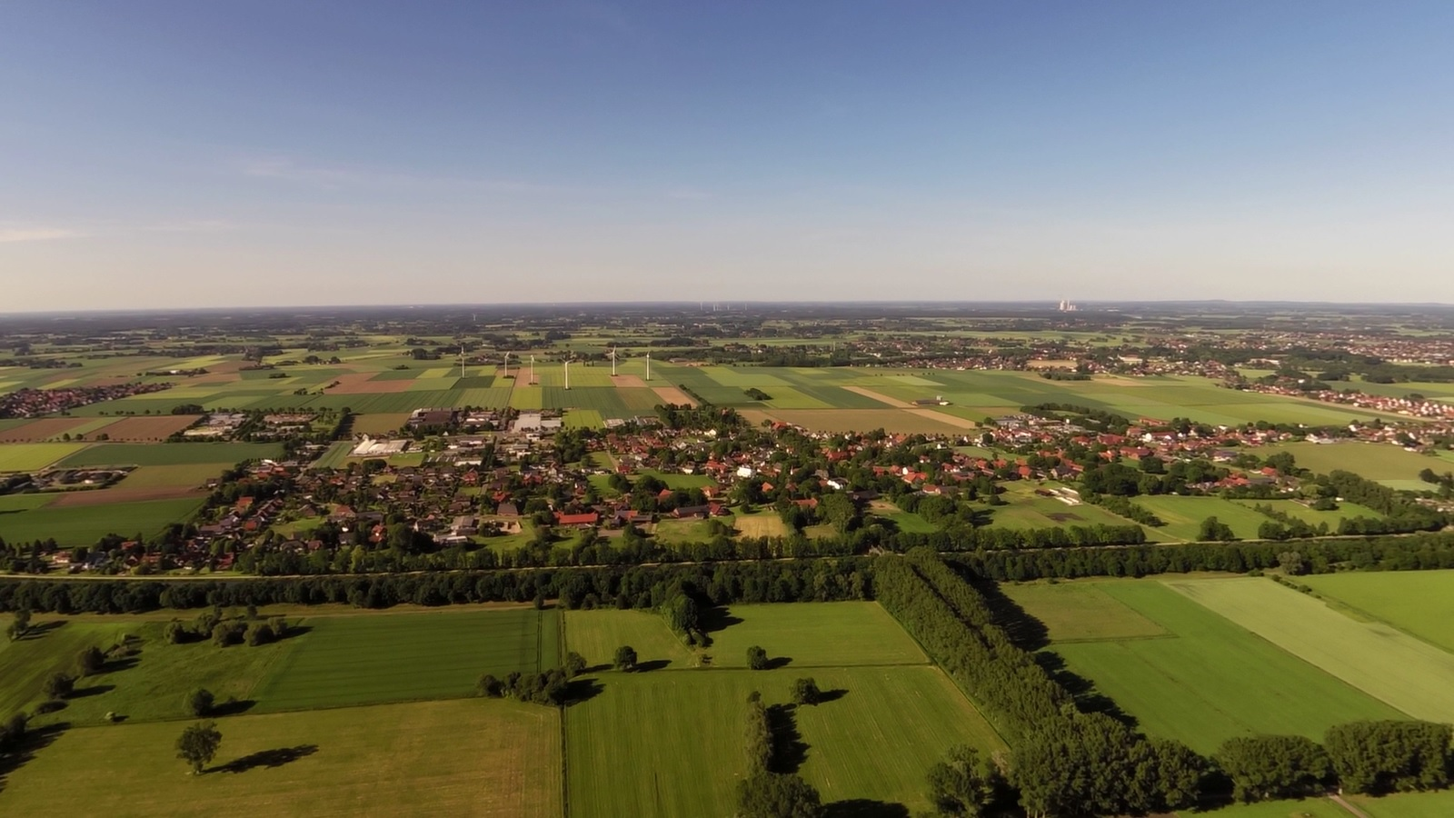 Luftbild Bastauwiesen in Richtung Hahlen